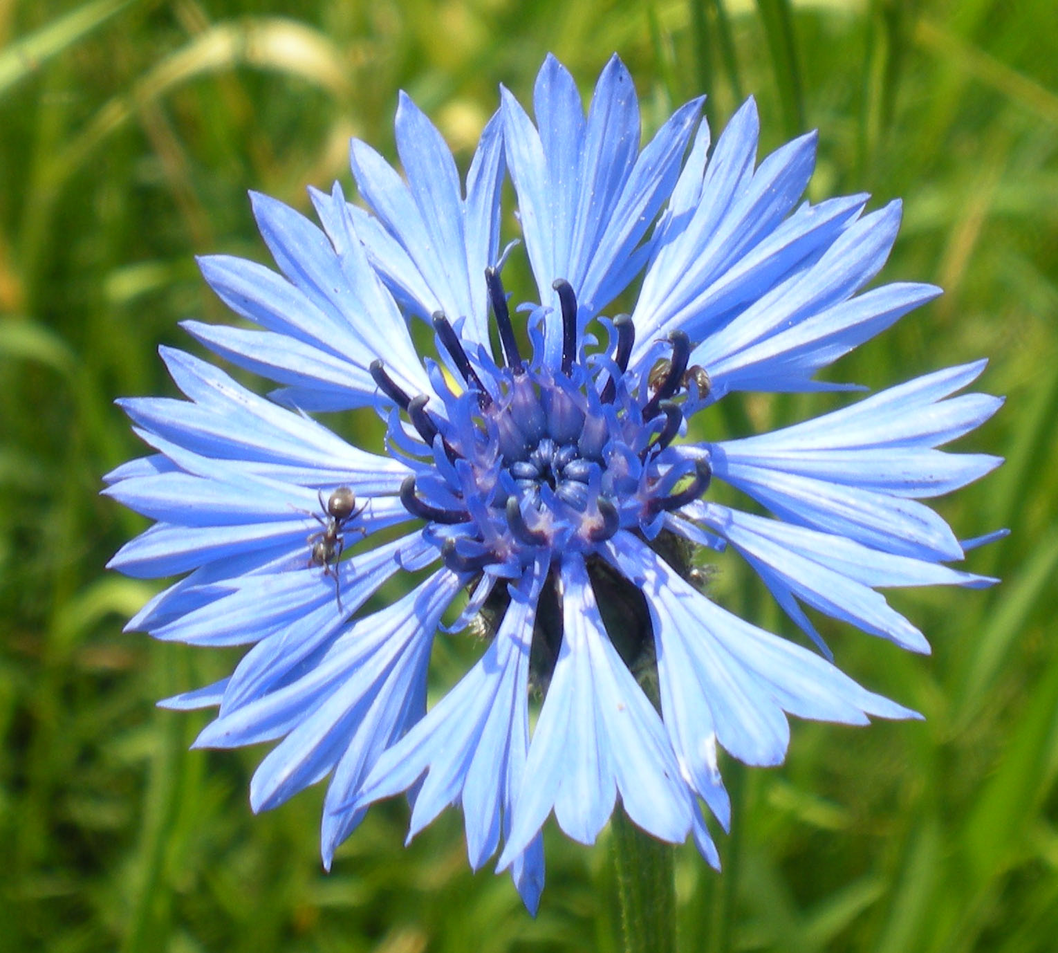 chaber bławatek (kwiat)